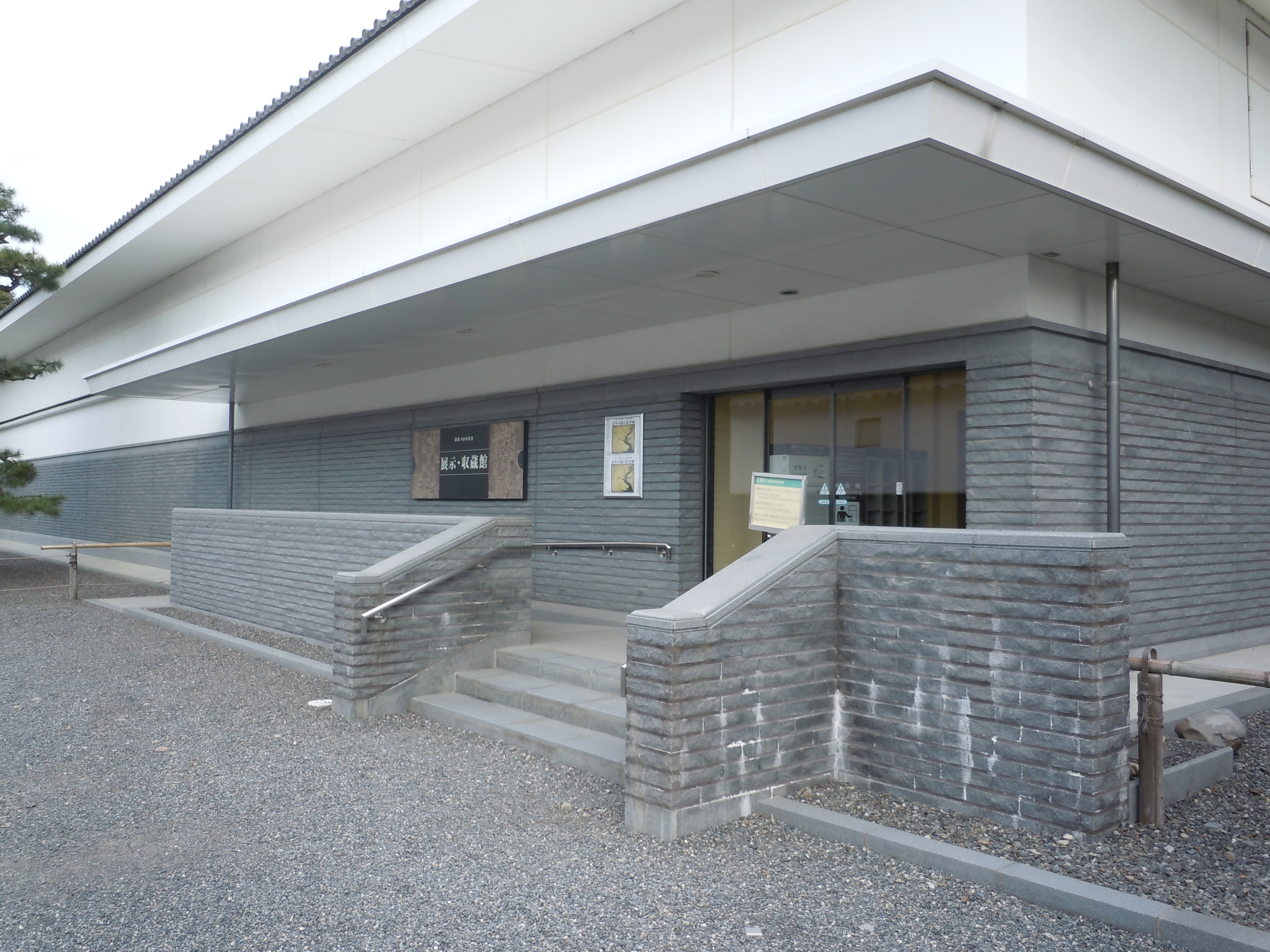 二条城にある展示収蔵館。